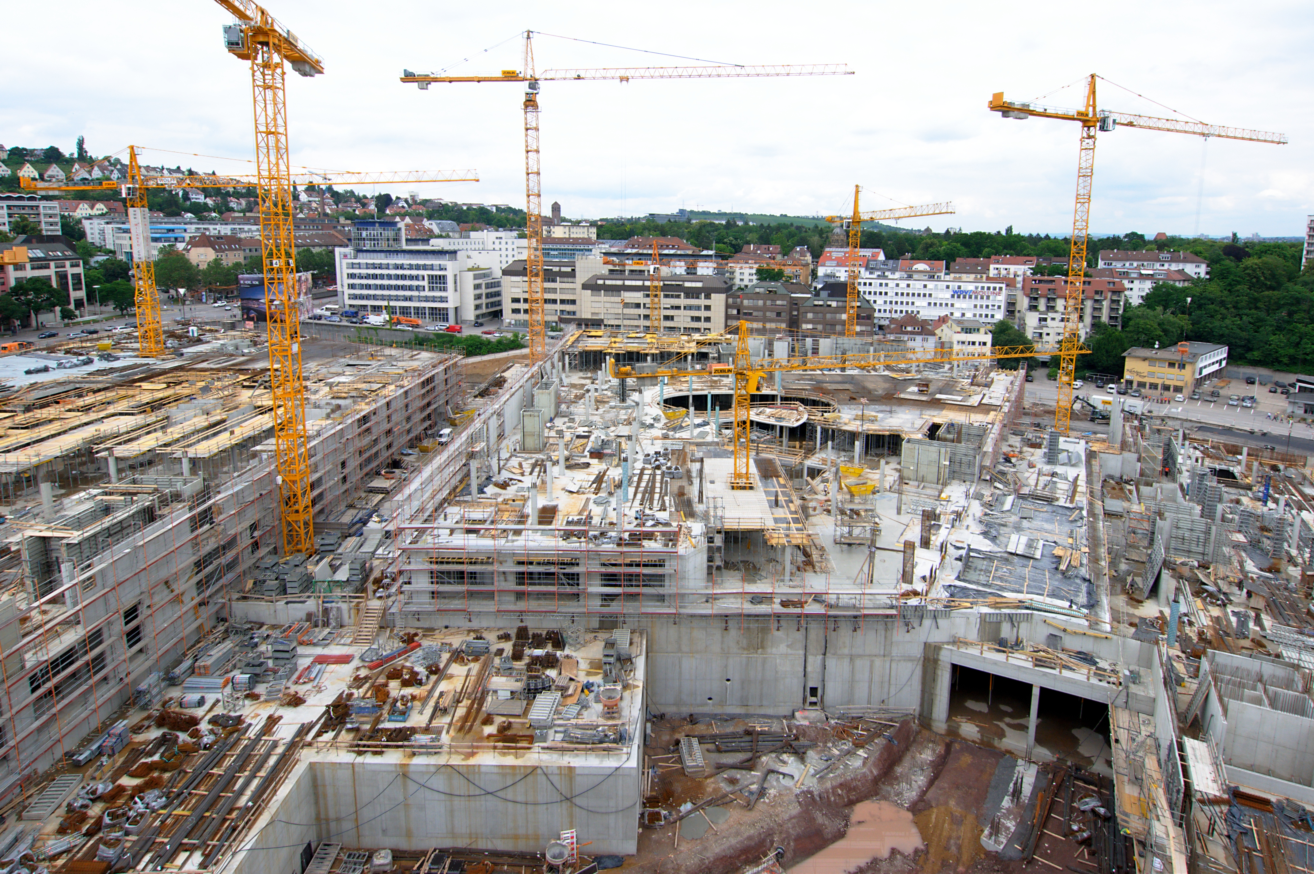 Baustelle des Milaneo in Stuttgart, Juli 2013